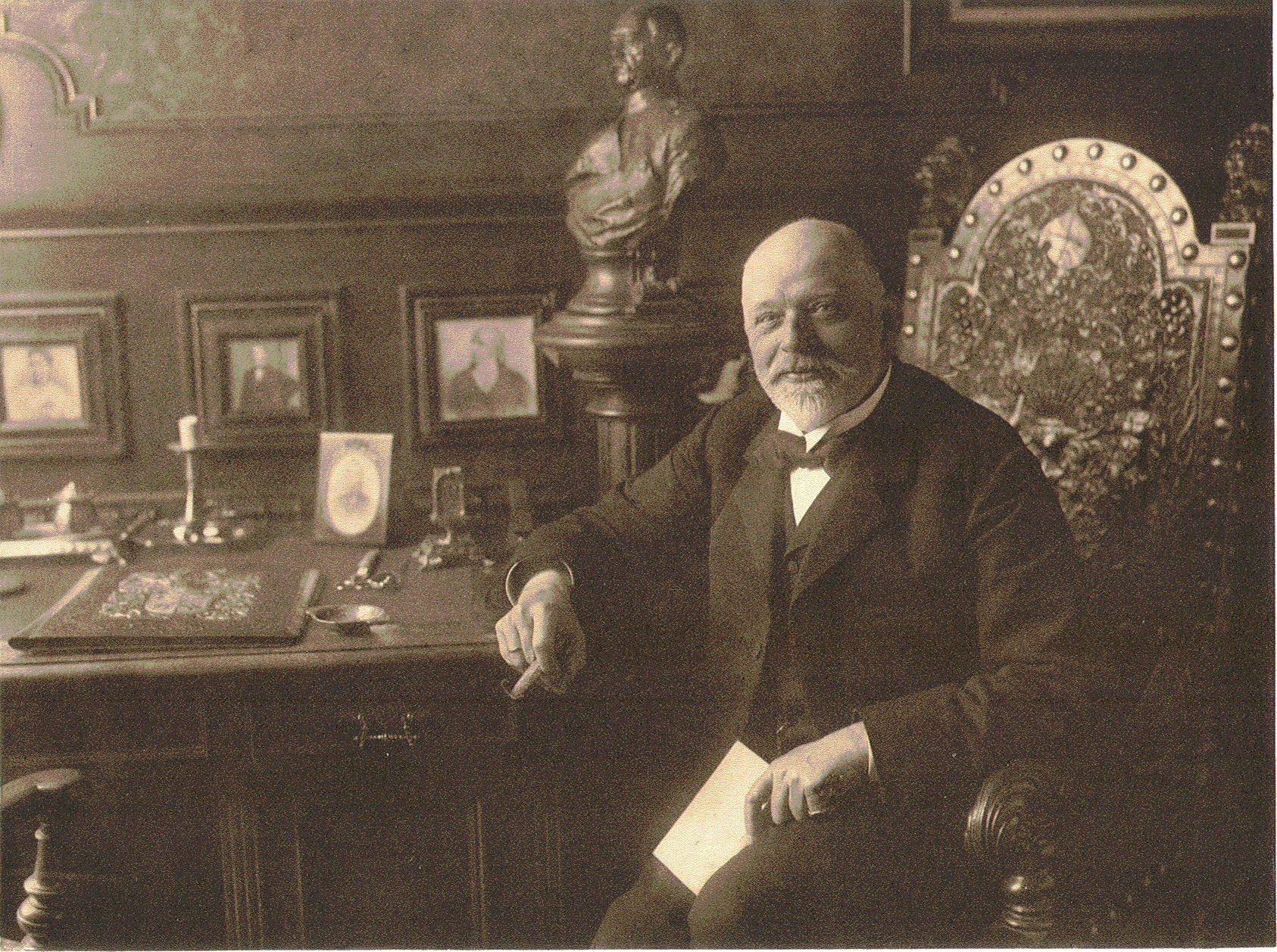 Arthur Lutteroth (1846–1912), Bankier und Politiker